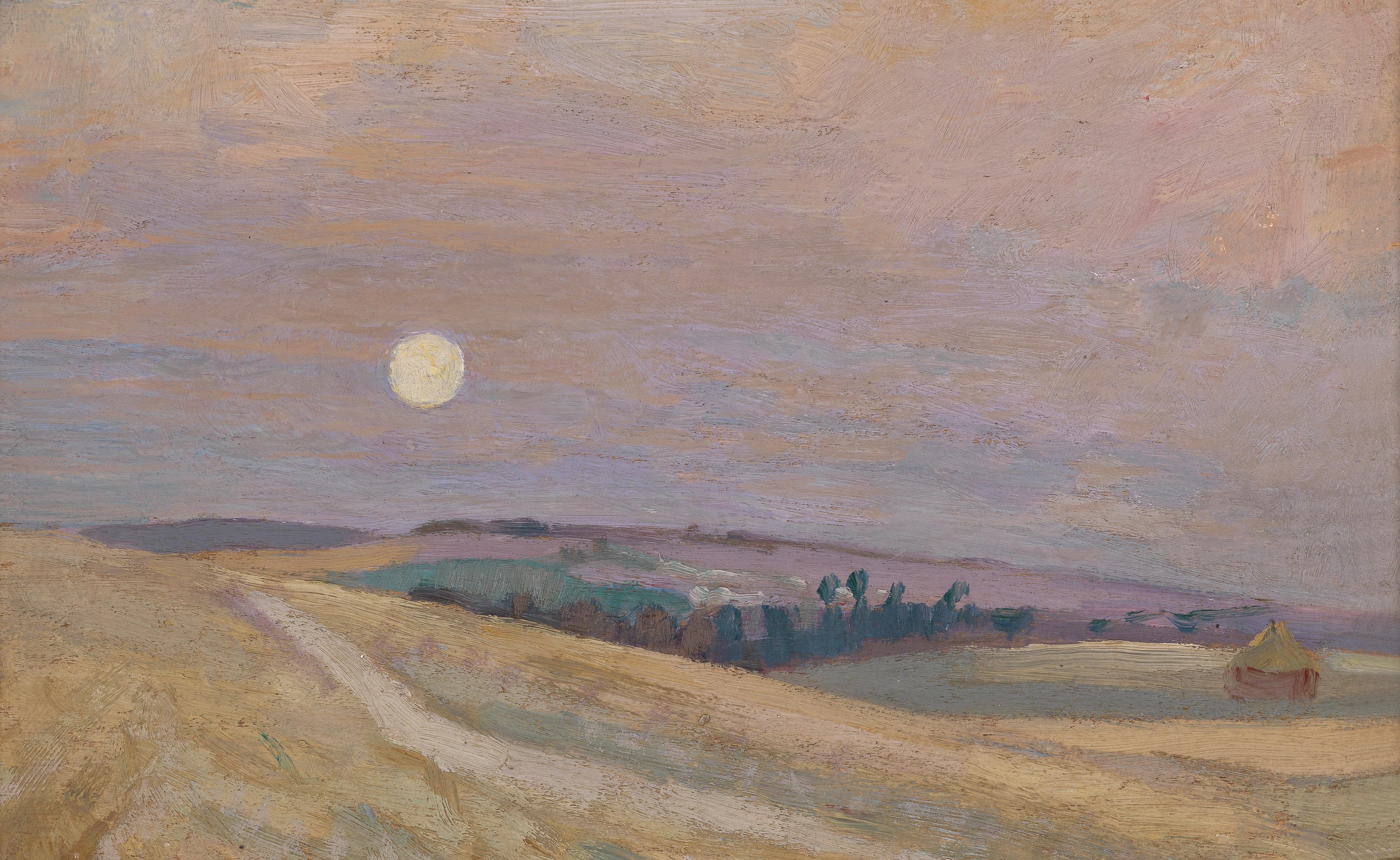 Sonnenuntergang